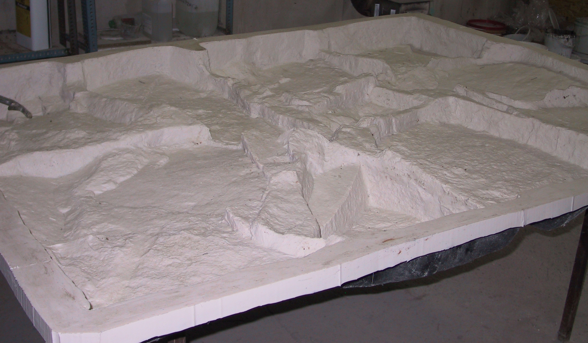 Zdjęcie wykonane po wyprodukowaniu formy silikonowej